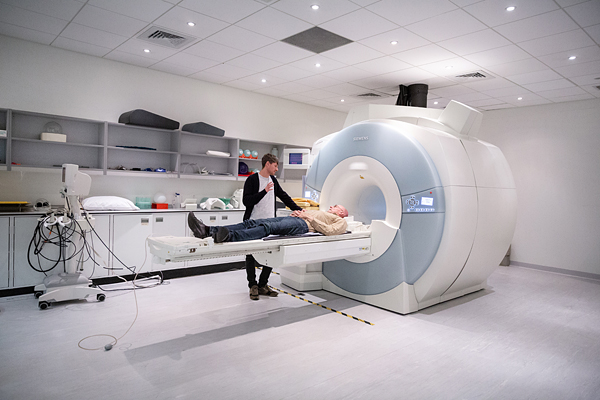 Michael Pollan y Robin Carhart-Harris conversando en el laboratorio de fMRI, Centro Imperial para la Investigación Psicodélica. Fotografía por Thomas Angus, Imperial College London.